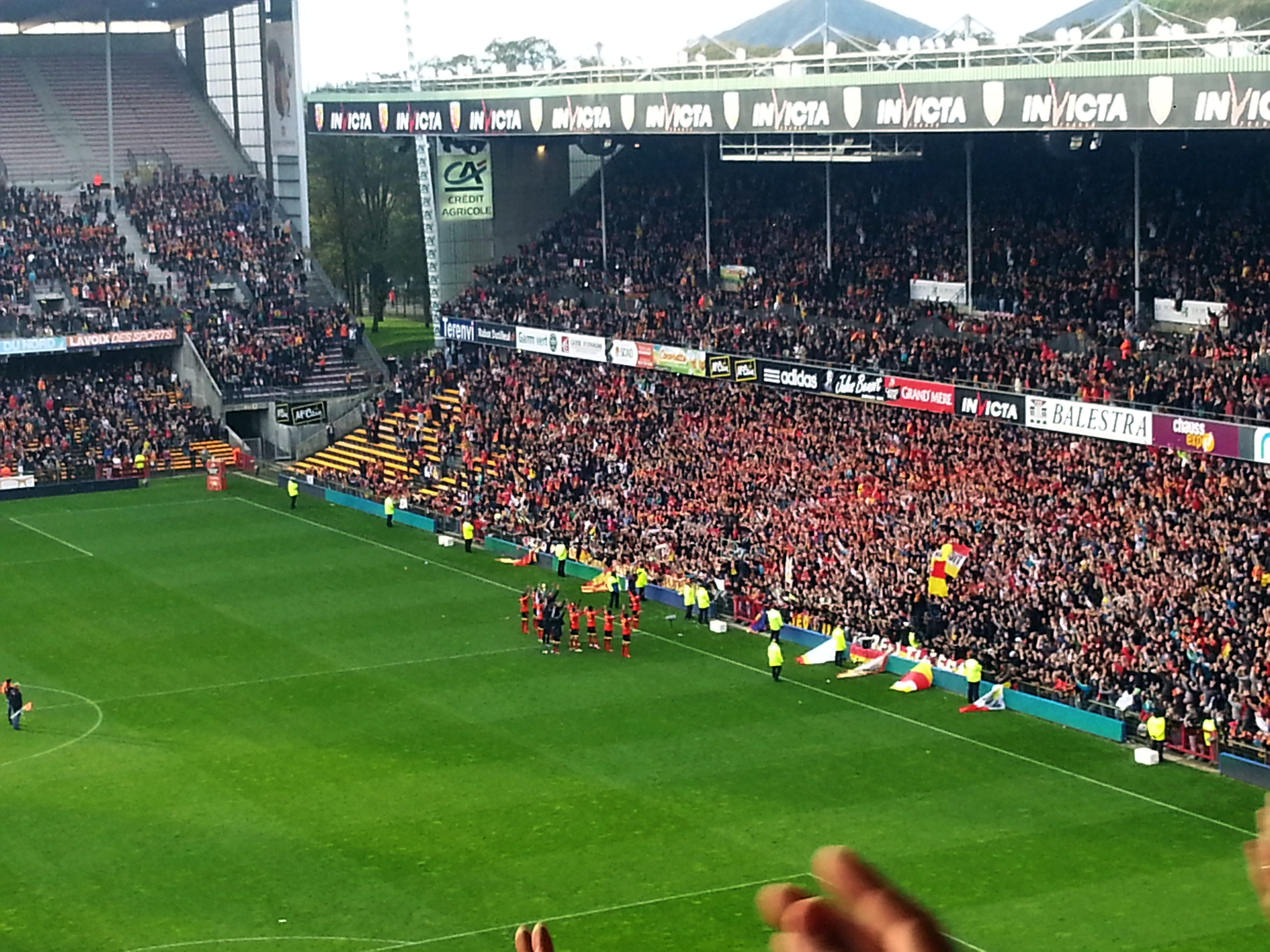 La communion entre les joueurs du RC Lens et les 31 293 spectateurs après la victoire contre Caen (2-1)